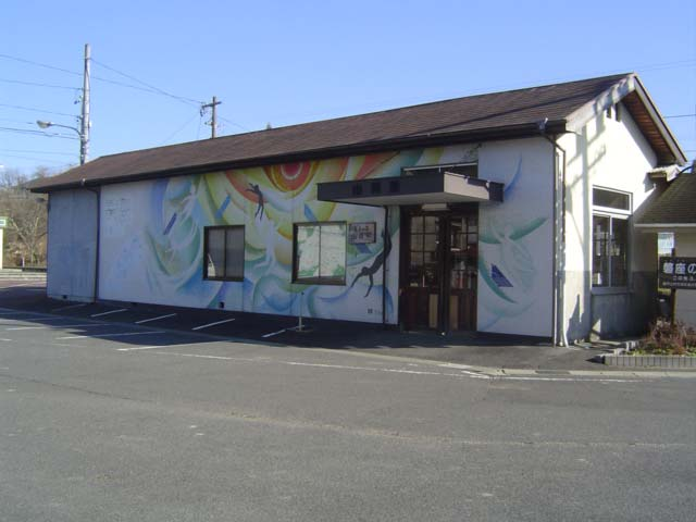 明知鉄道山岡駅駅舎 投稿者が撮影（2004年12月22日）